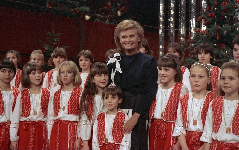 12.12.1986 Hannelore Kohl sagt Danke Weihnachtskonzert "Lieder öffnen unsere Herzen" veranstaltet vom Kuratorium ZNS für Unfallverletzte mit Schäden des Zentralen Nervensystems e.V. in der Alten Oper in Frankfurt. Die Präsidentin des Kuratoriums ZNS, Hannelore Kohl, lud Mitbürger, die sich helfend in den Dienst ihrer Mitmenschen stellen, ein, um ihren Einsatz zu danken. Durch den Abend führte die Fernseh-Moderatorin, Caroline Reiber.